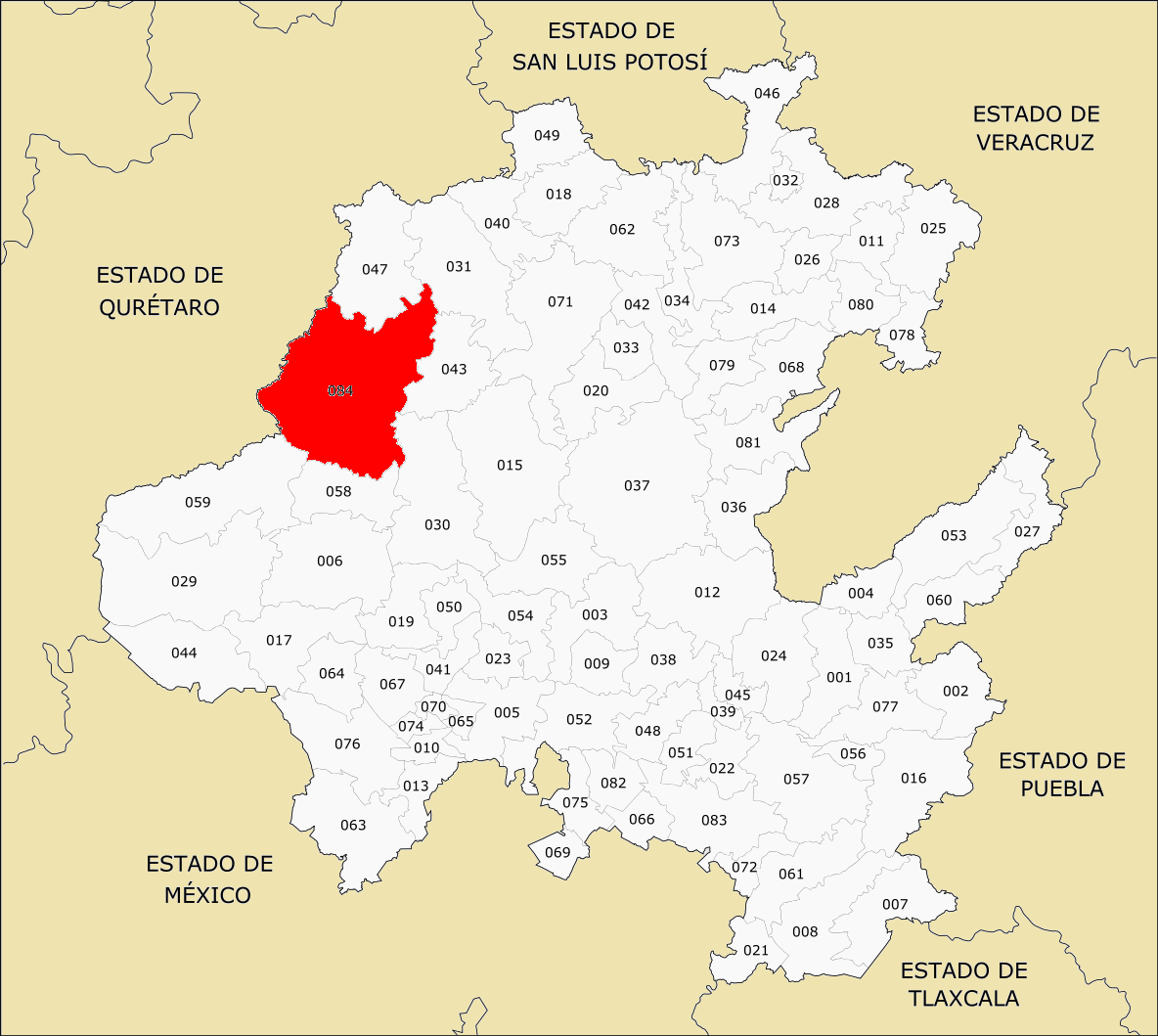 Municipios de Hidalgo